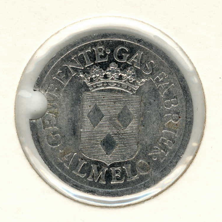 Gaspenning Almelo - voorzijde. Diameter 23,5 mm